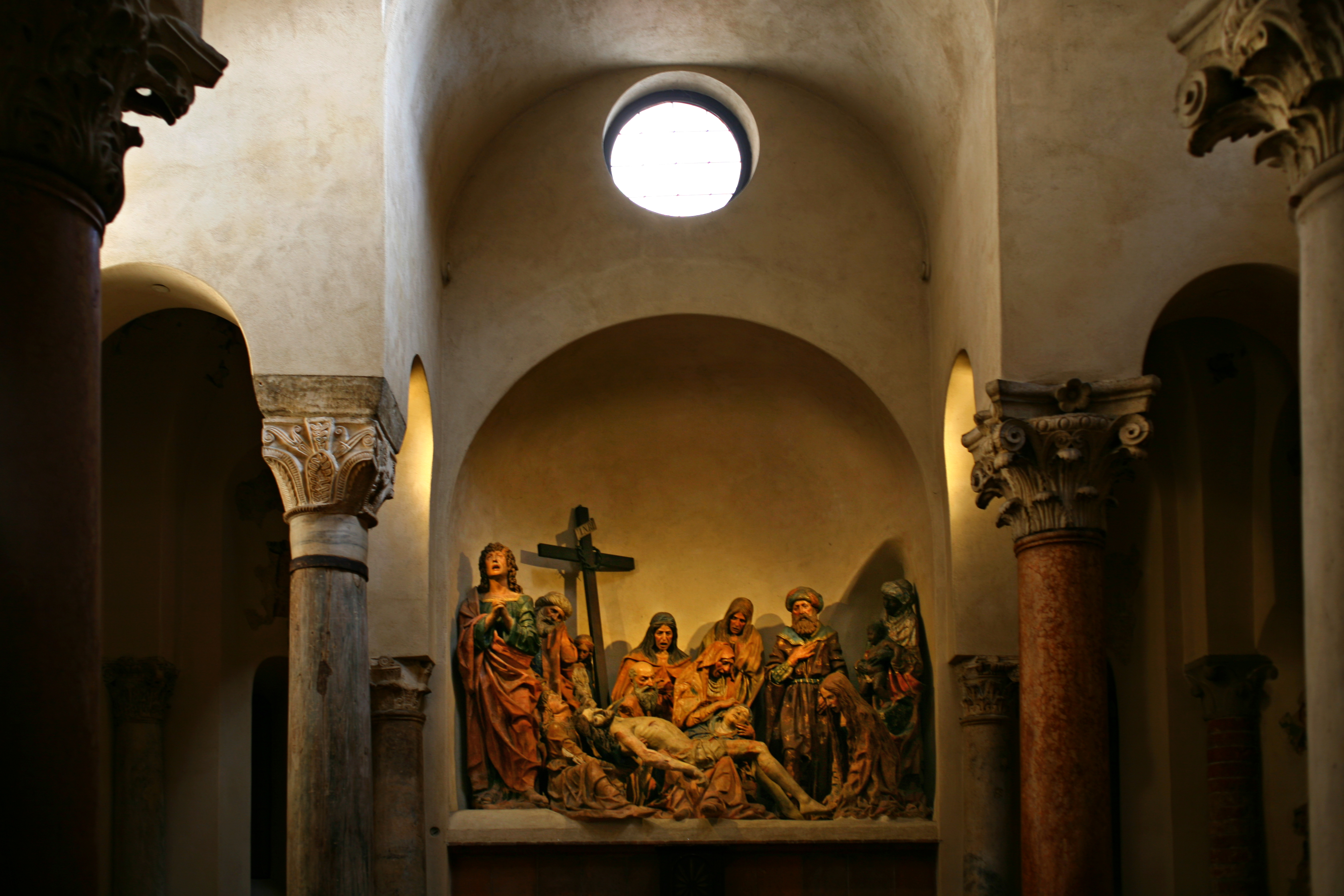 La chiesa di San Satiro a Milano nelle sue viste esterne e interne